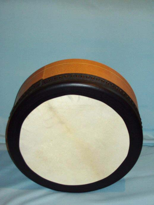 Bodhrán von vorne